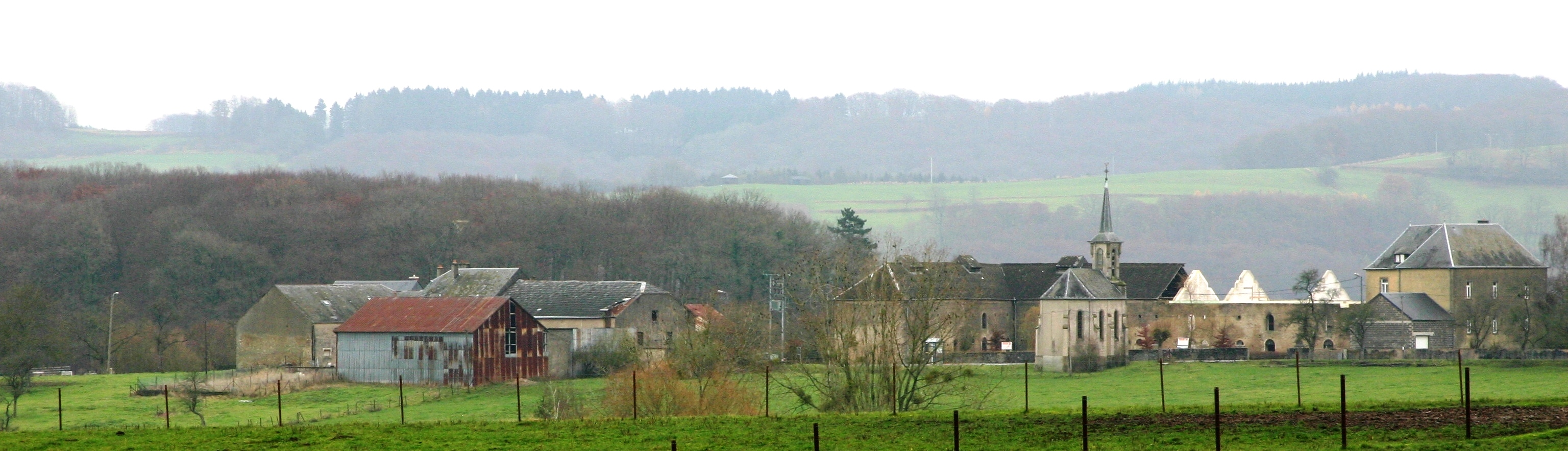 Folkendeng vun der Suewelbuererstrooss gesinn.